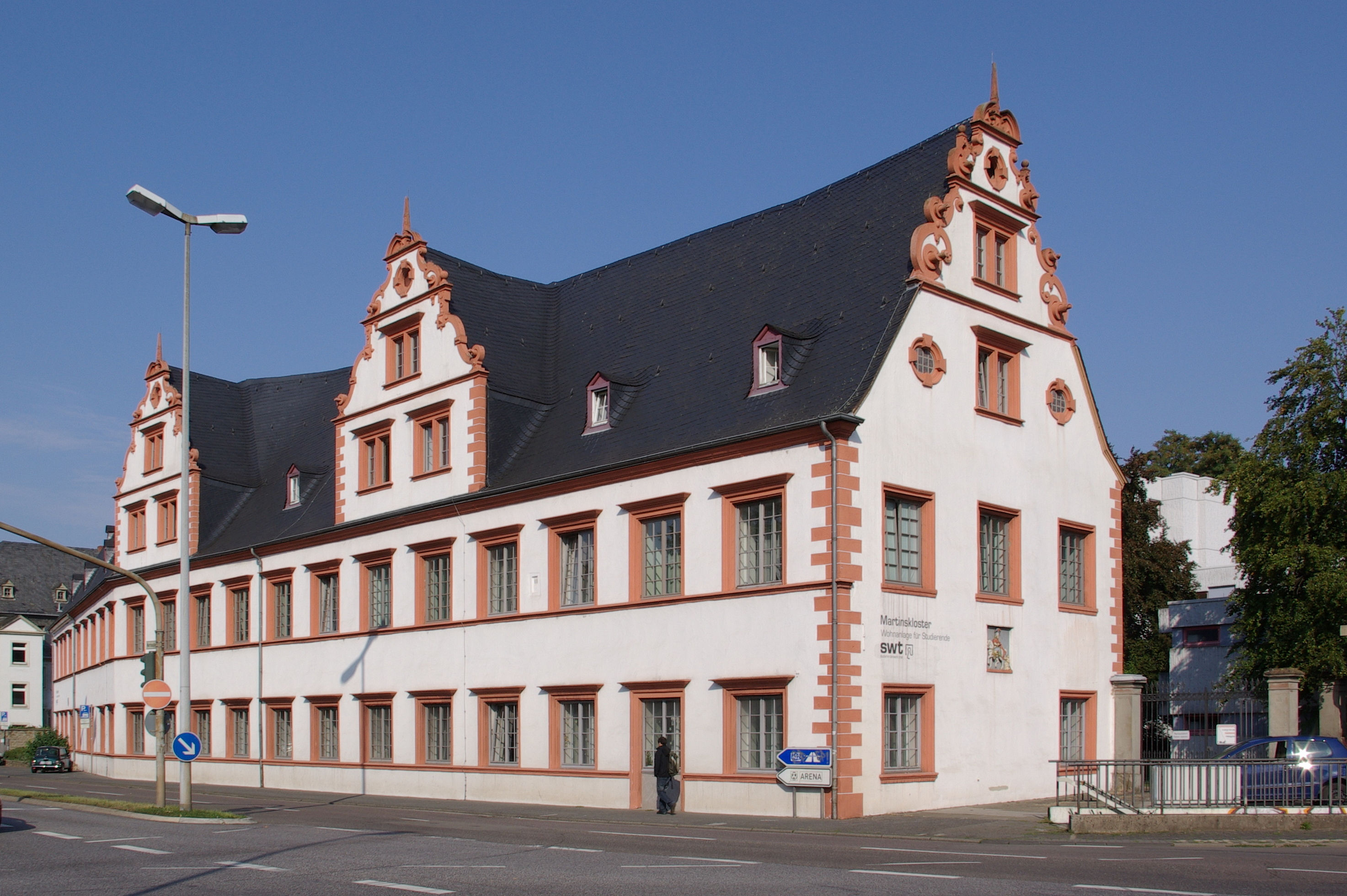 Trier, Ehemalige Benediktinerabtei St. Martin. Wohnflügel des ehem. Klosters, 21-achsiger Putzbau mit Renaissancegiebeln, 1626 vollendet *